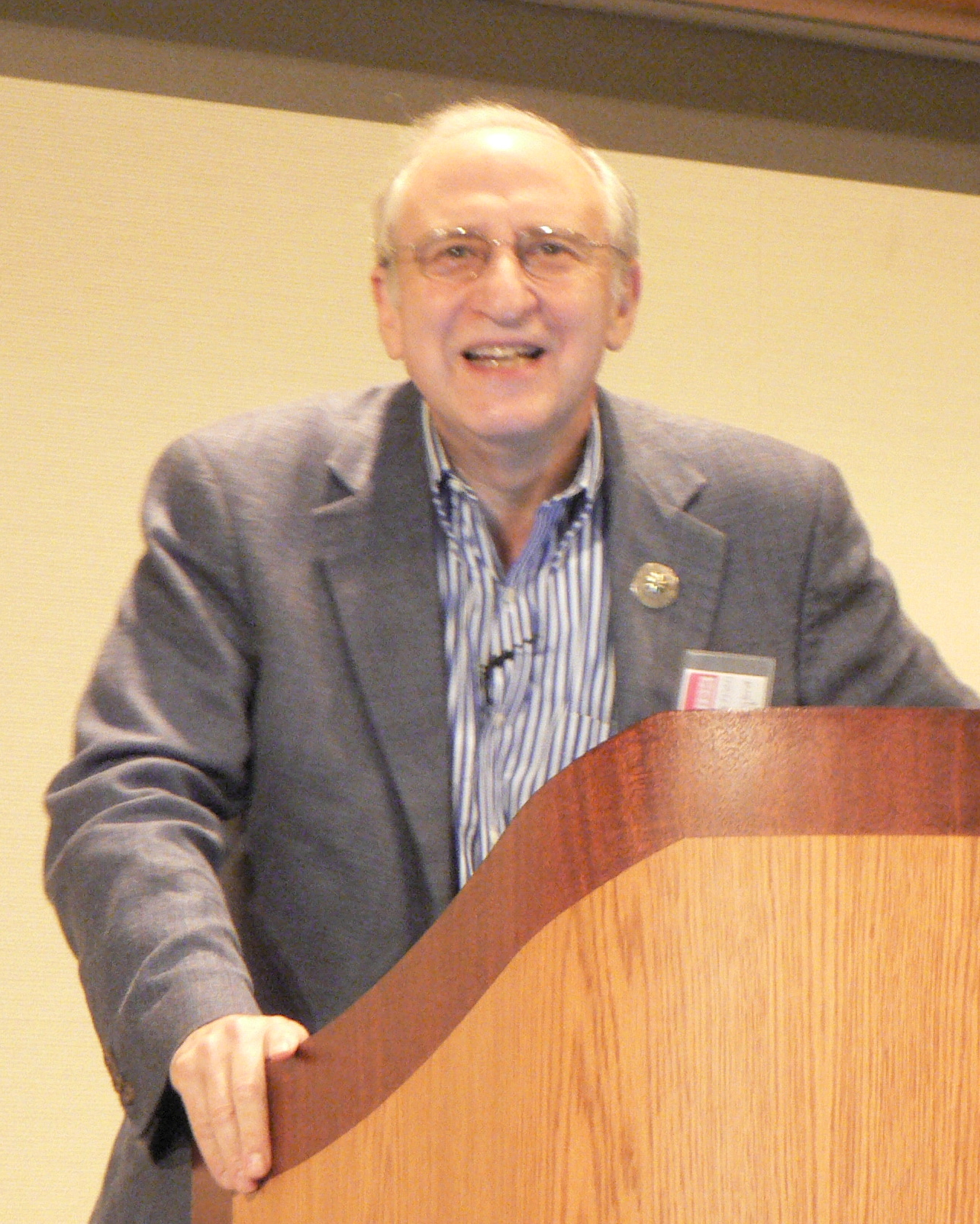 Ben Shneiderman at IBM Research, Almaden